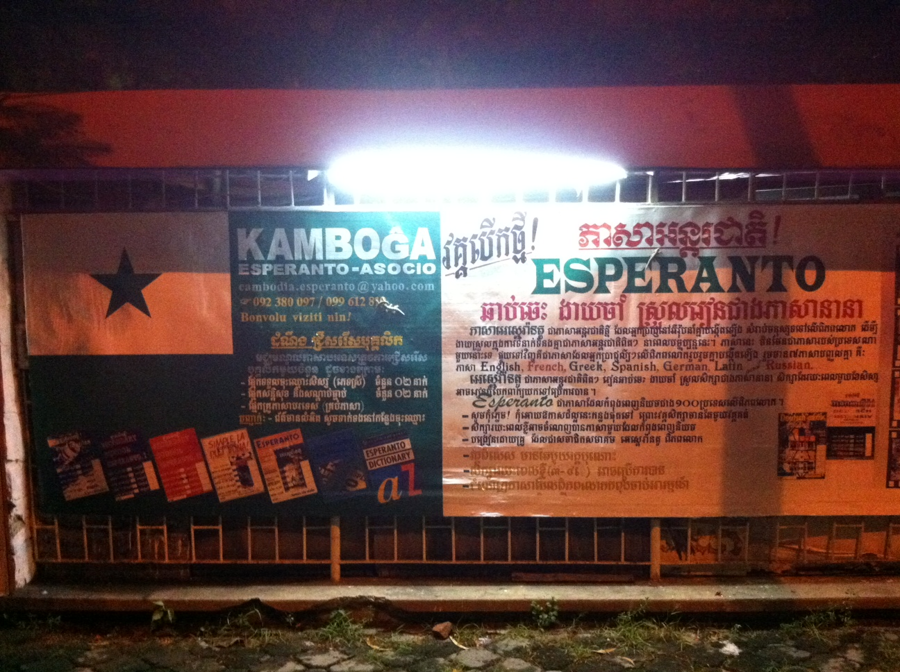 Foto ekster Kamboĝa Esperanto-Asocio farita de Anirudh Bhati (Laŭ Chuck Smith: "La ... foto estas de Anirudh Bhati kaj li metis sub la sama CC-licenzo."